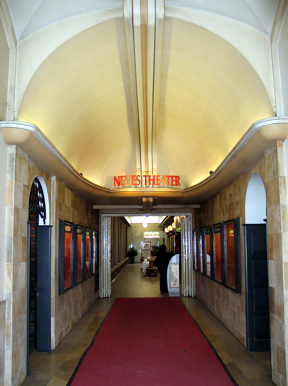 Durchgang im Haus Basse zum Neuen Theater und der Restauration La Galleria, links davor der Treppenaufgang, rechts davon der Zugang zum Fahrstuhl ...